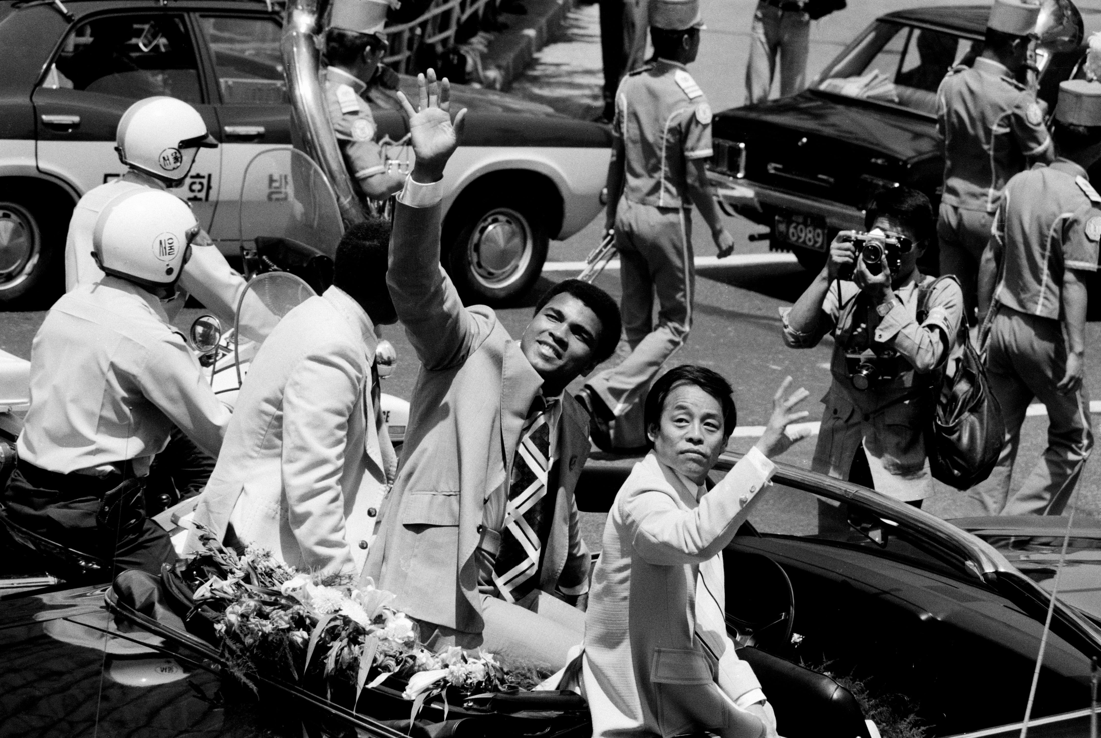 촬영일 : 1976년 06월 27일 촬영장소 : 대한민국 서울 참석자 : 무하마드 알리 인물상세정보 : 무하마드 알리(중앙) , 미상(좌 우) 관련내용 : 프로복싱 헤비급 세계챔피언 무하마드 알리 방한